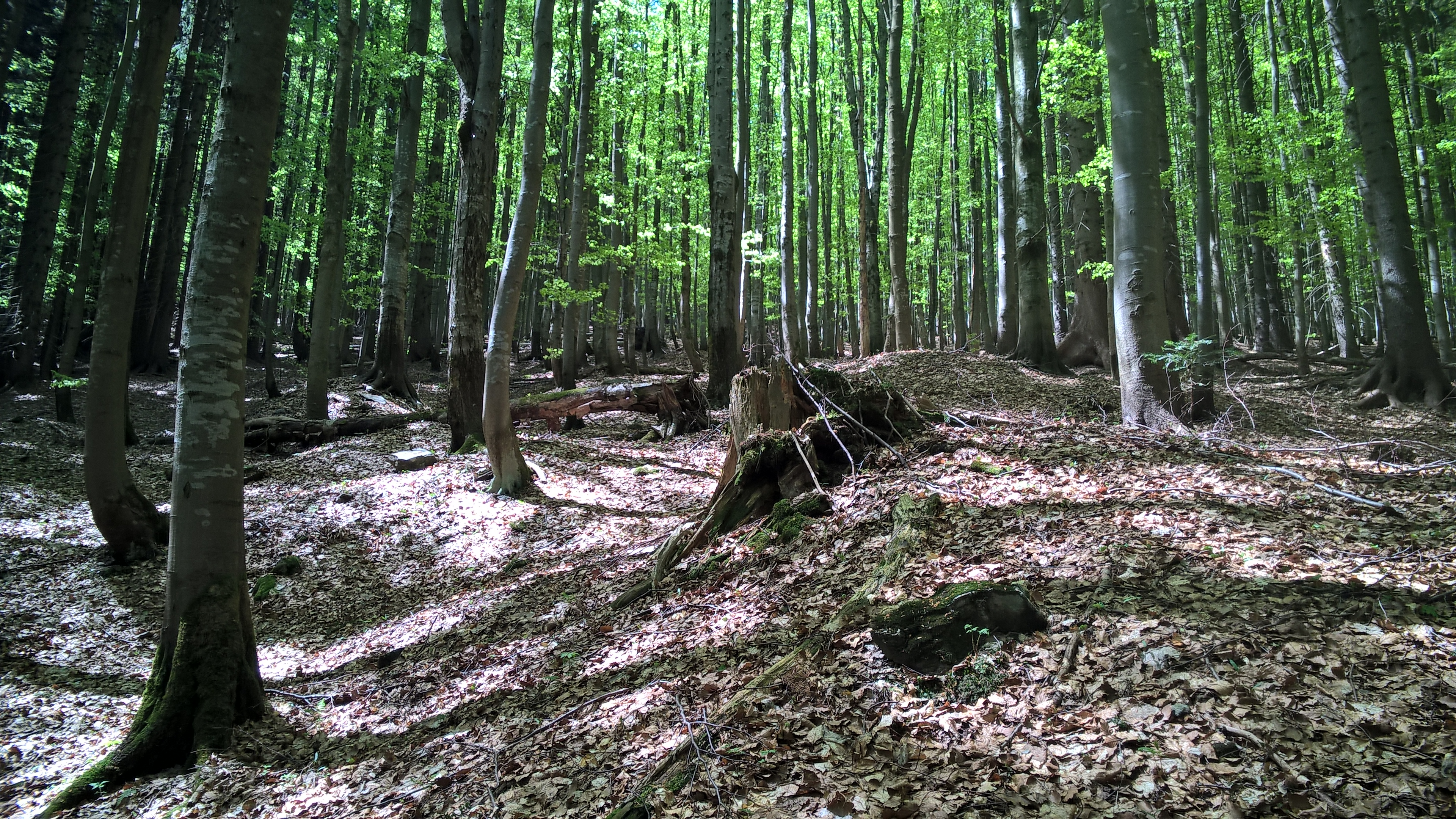 V bažinkách - bývalá PP nad Dolními Mísečkami